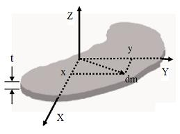 Tokagawa 薄片